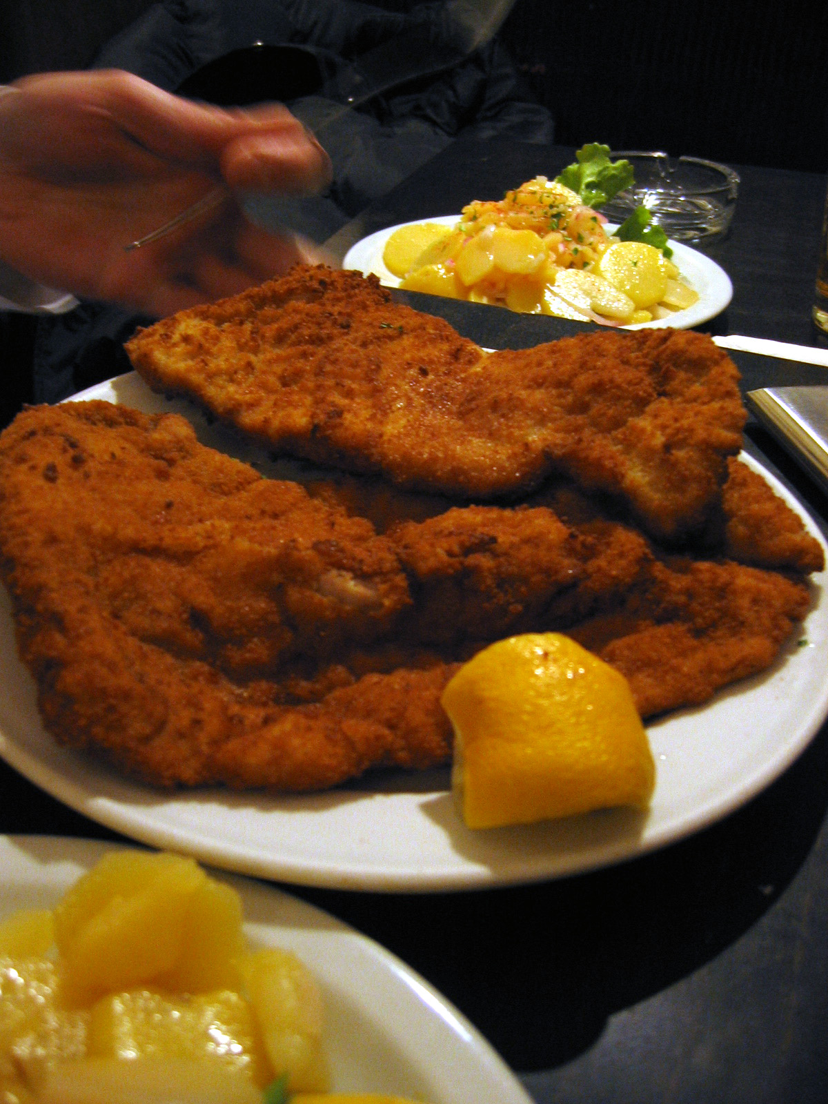 Wiener Schnitzel